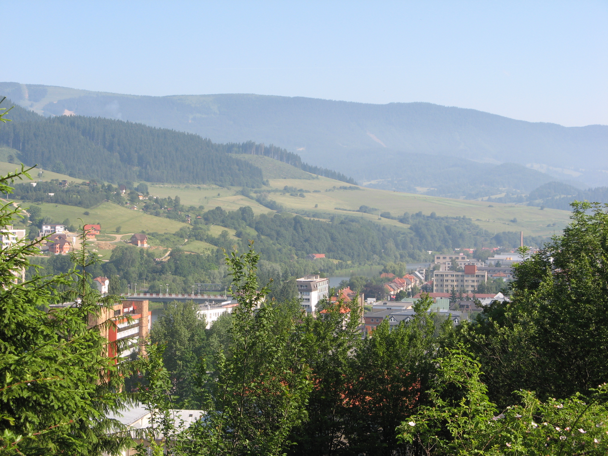 Dolny Kubin